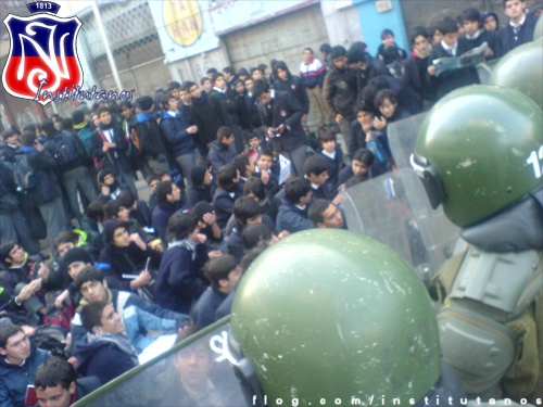 Bloqueando el paso